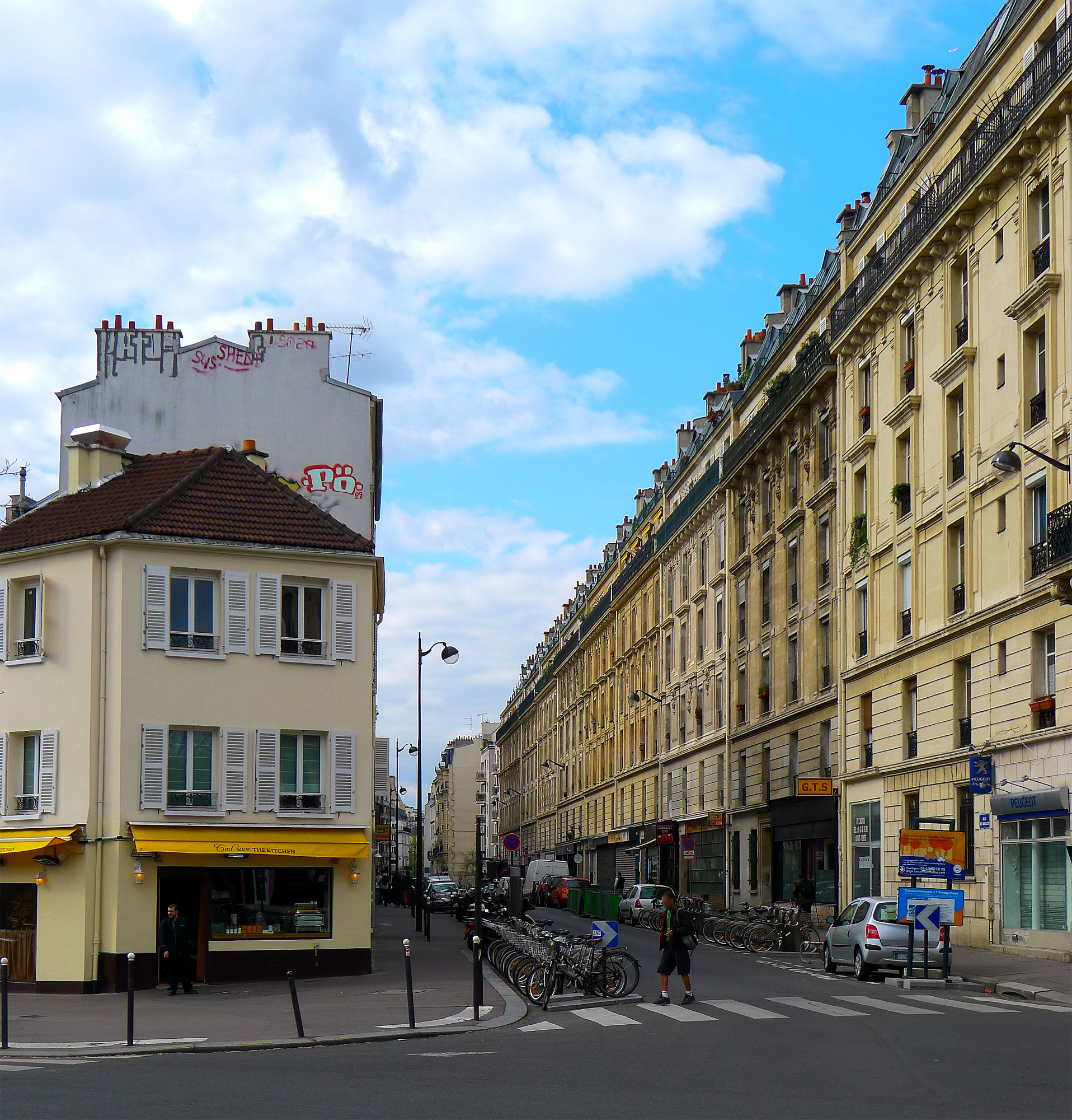 Rue des Boulets - Paris XI